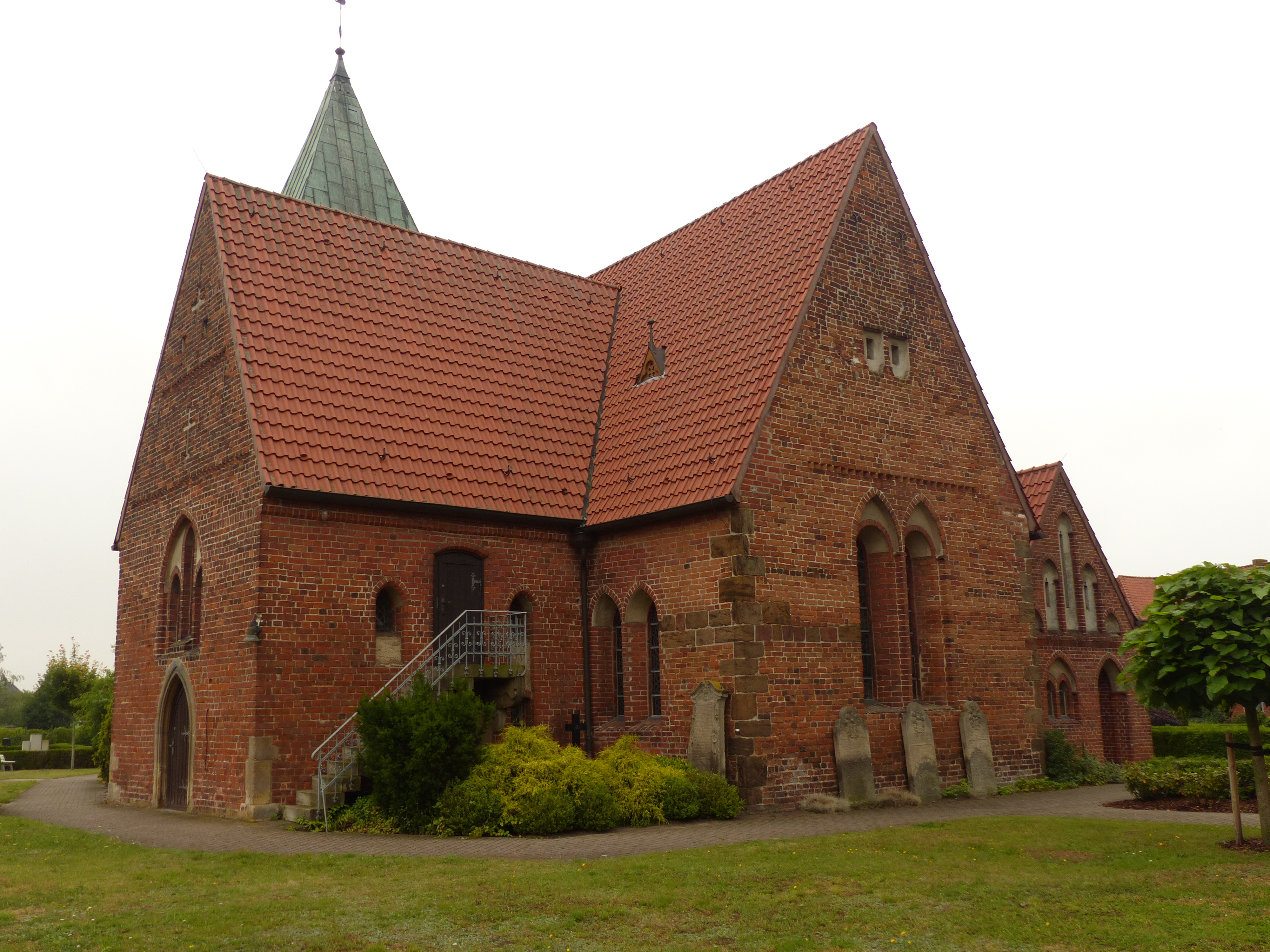 Chor der Andreaskirche in Riede von SO